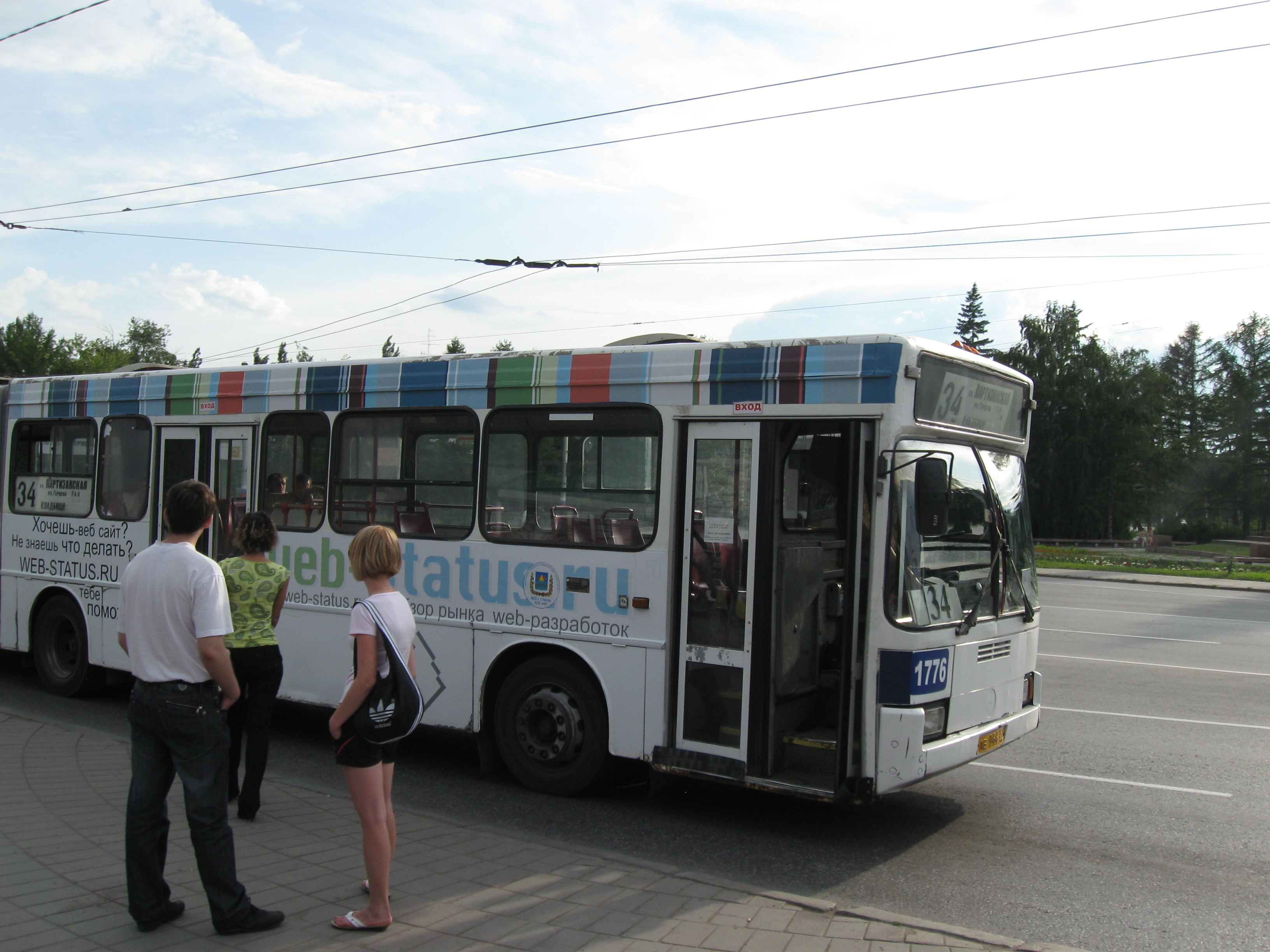 Автобус ГолАЗ АКА-6226 в Омске.